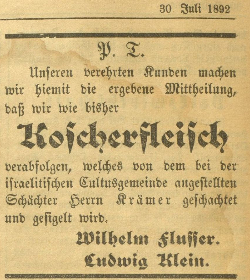 Reklama z r. 1892 na košer maso prodávané řezníky Wilhelmem Flusserem a Ludwigem Kleinem v Teplicích. Dobový teplický zpravodaj "Teplitz-Schönaeur Anzeiger.